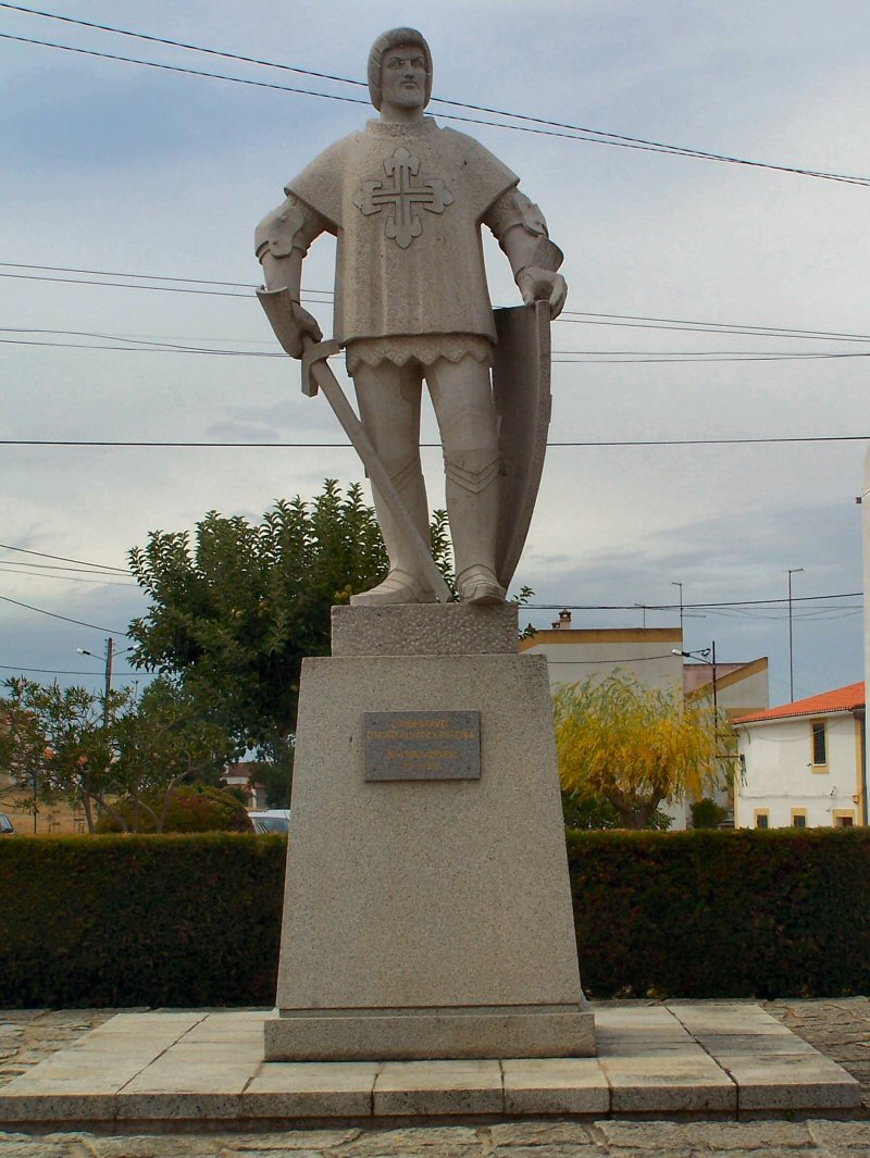 Estátua de D. Nuno Álvares Pereira em Flor da Rosa.